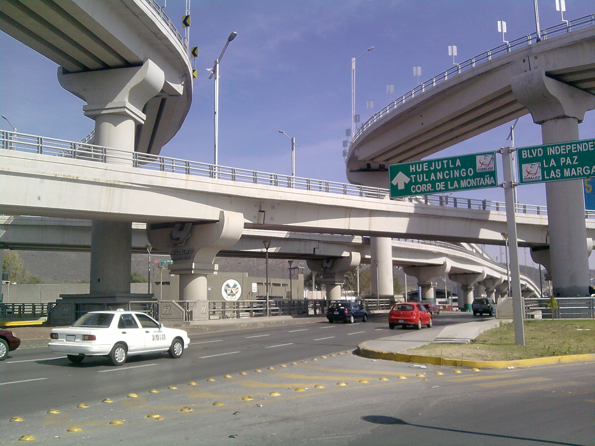 Multidistribuidor Vial Centenario de la Revolución Cruce del Blvd. Luis Donaldo Colosio, el Eje Viaducto Río de las Avenidas y Blvd. Valle de San Javier, donde circularán diariamente 22 mil vehículos.